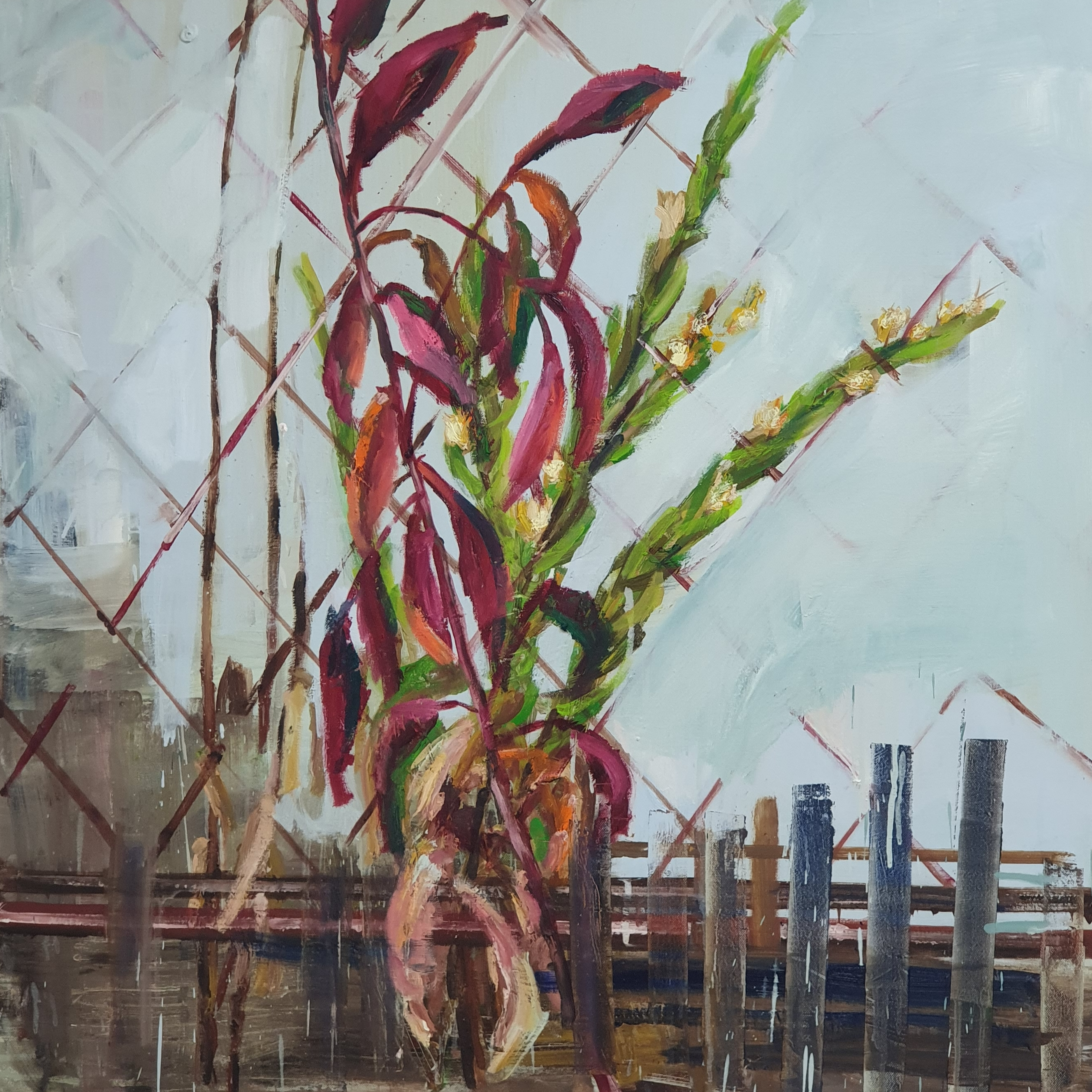 ציור של עופרי מרום.